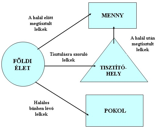 A halál utáni állapotok katolikus szemszögből